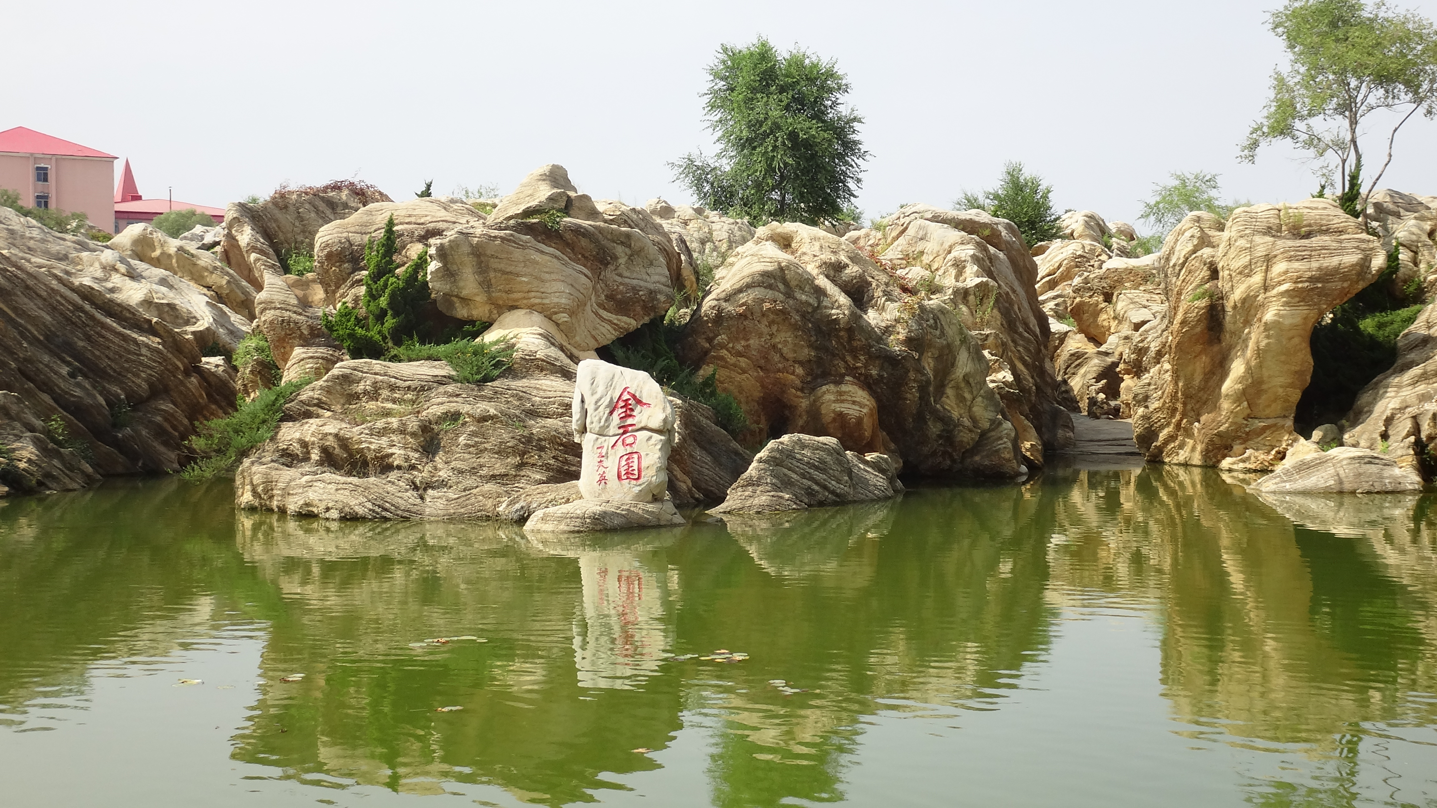 大连金石滩地区的金石园。